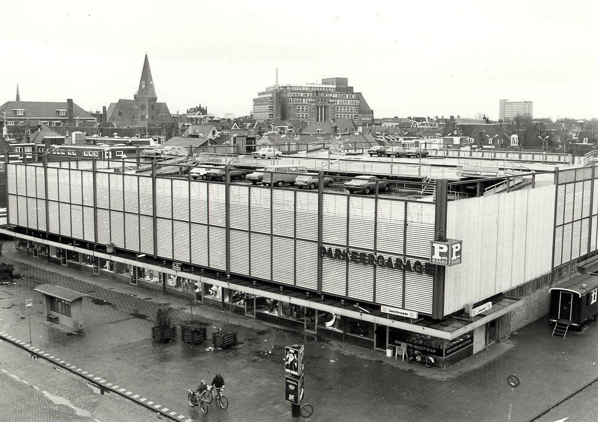 De Raaks Parkeergarage aan de Raaks, ziend naar het zuid oosten. Met op de achtergrond de kerk aan de Gedempte Oude Gracht en Vroom en Dreesman aan het Verwulft. Aangekocht in 1979 van fotograaf C. de Boer. - Negatiefnummer 18755 k 36. - Gepubliceerd in het Haarlems Dagblad van 12.12.1979. Identificatienummer 54-010171